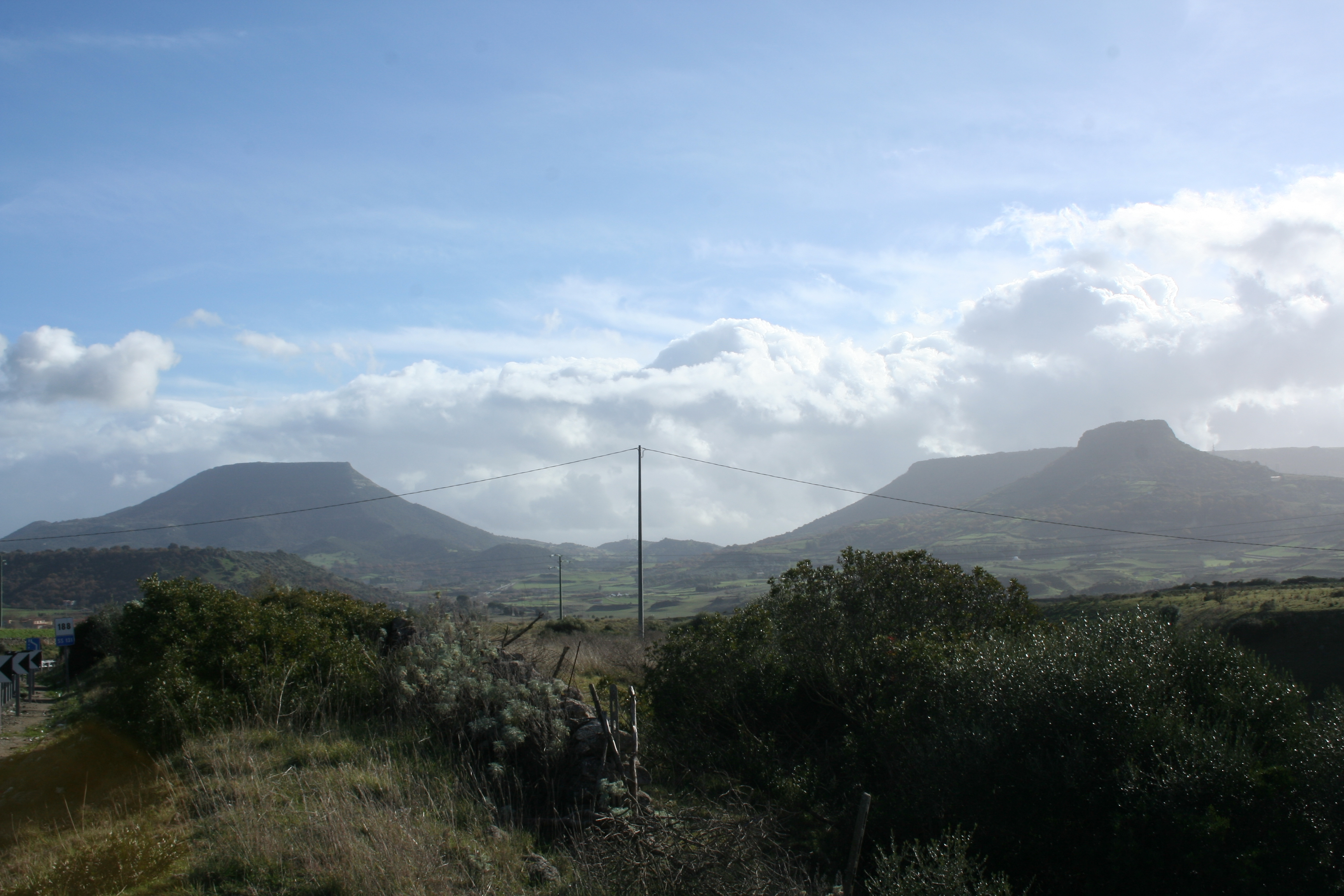 Le Mesa di Monte Santo e Monte Pelau, Siligo - Sardegna